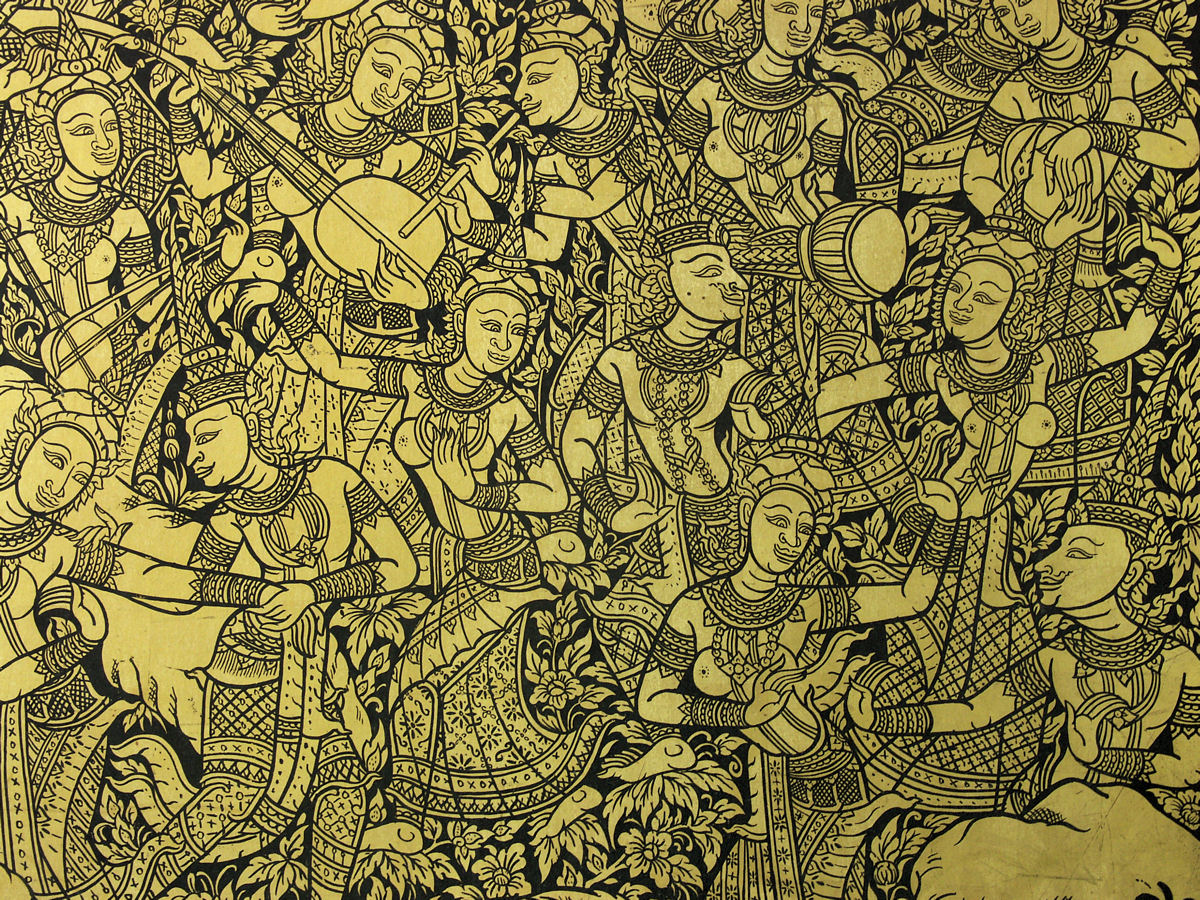 Wat Suthat, Bangkok, Thailand